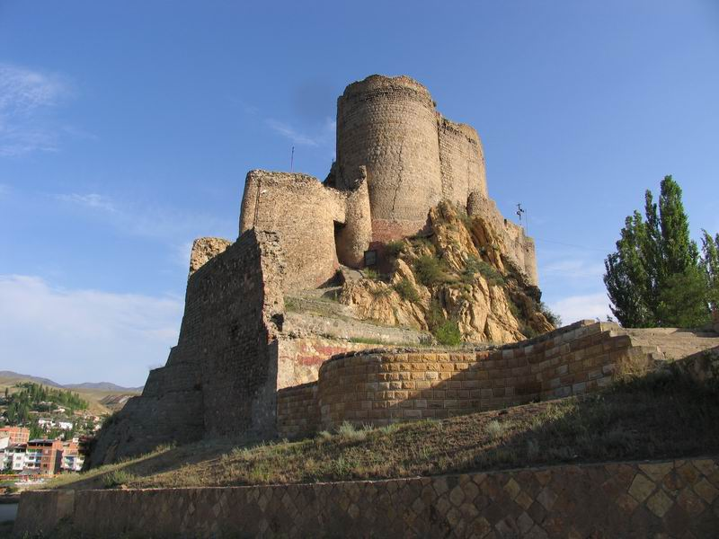 ოლთისის ციხე